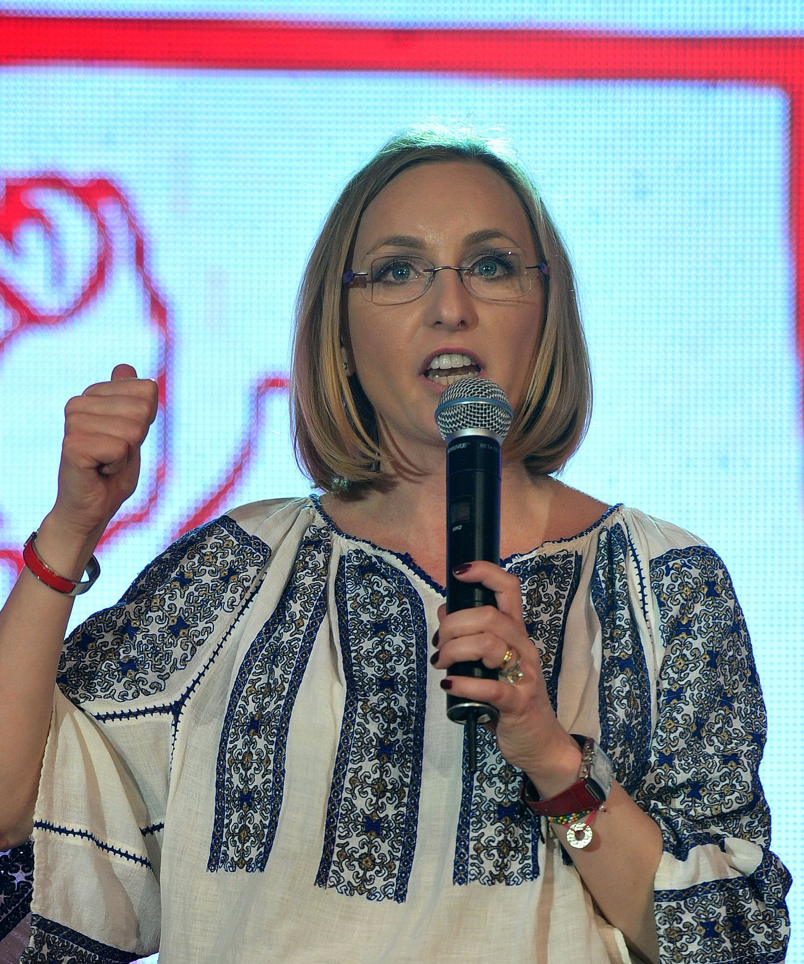 Lansarea candidaturii Gabrielei Szabo pentru Camera Deputatilor, Voluntari - 04.05 (43)